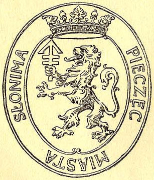 Беларуская (тарашкевіца): Слонім (Słonim). Пячаць з гербам места